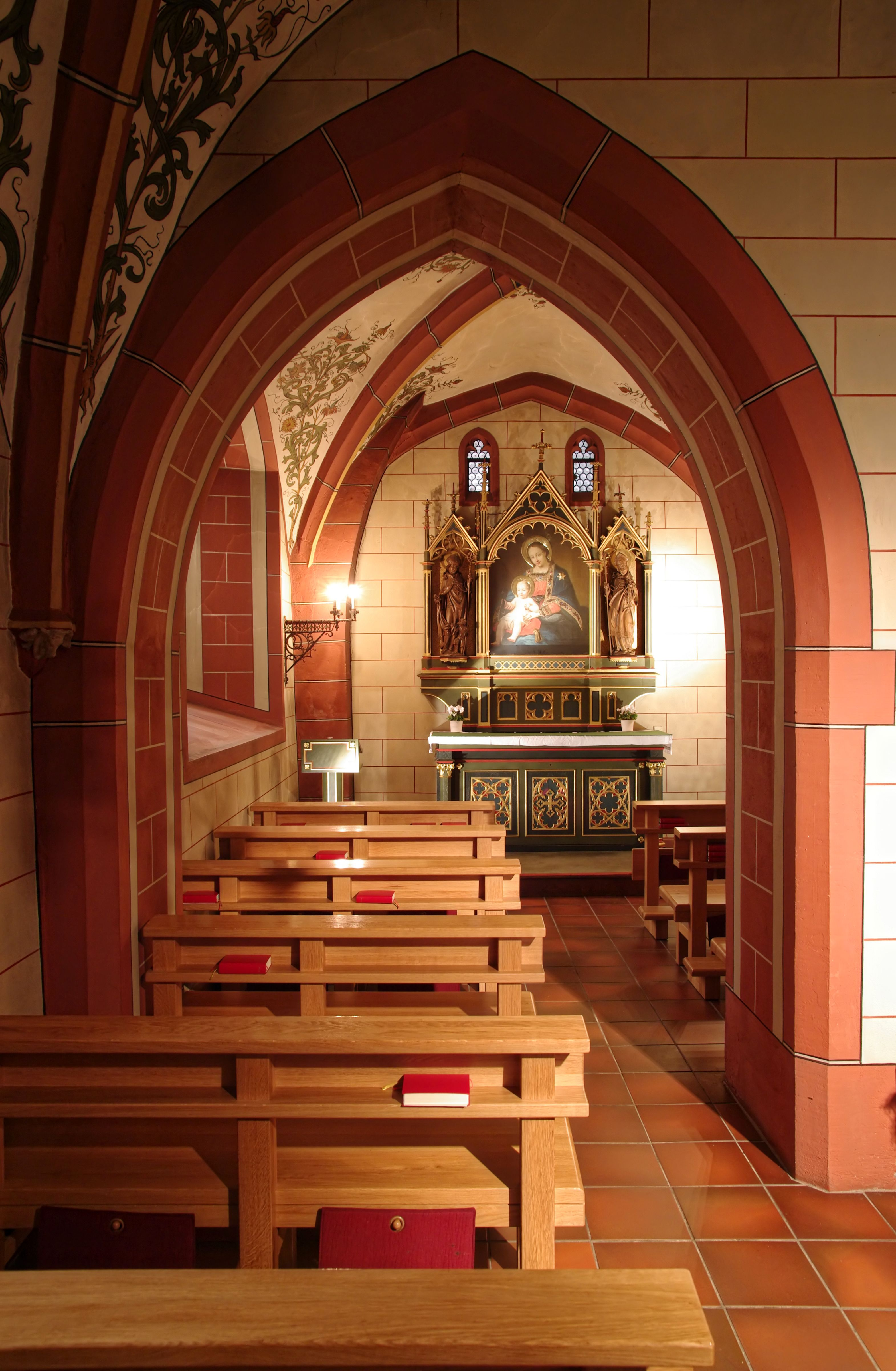 St.Martin in der Innenstadt